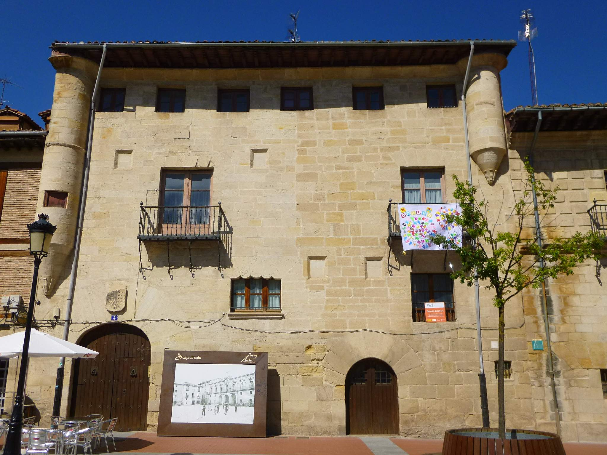 Miranda de Ebro - Casa de los Urbina